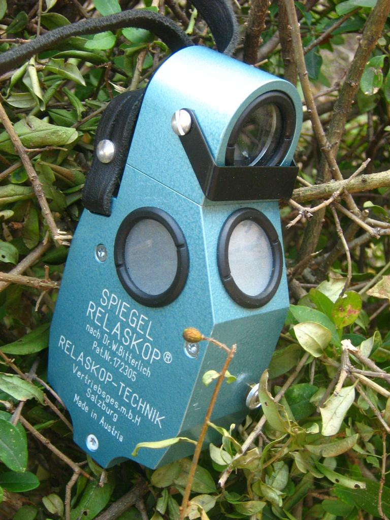 Ein Spiegelrelaskop nach Dr. W. Bitterlich für die Ausführung der Winkelzählprobe in Waldbeständen (hauptsächlich Ermittlung der Grundfläche, jedoch auch des Vorrates oder der Stammzahlen, der Geländeneigung, der Baumhöhe und spezieller Mittelbaumhöhen und Baumdurchmesser sowie Entfernungsmessungen). Winkelzählprobe